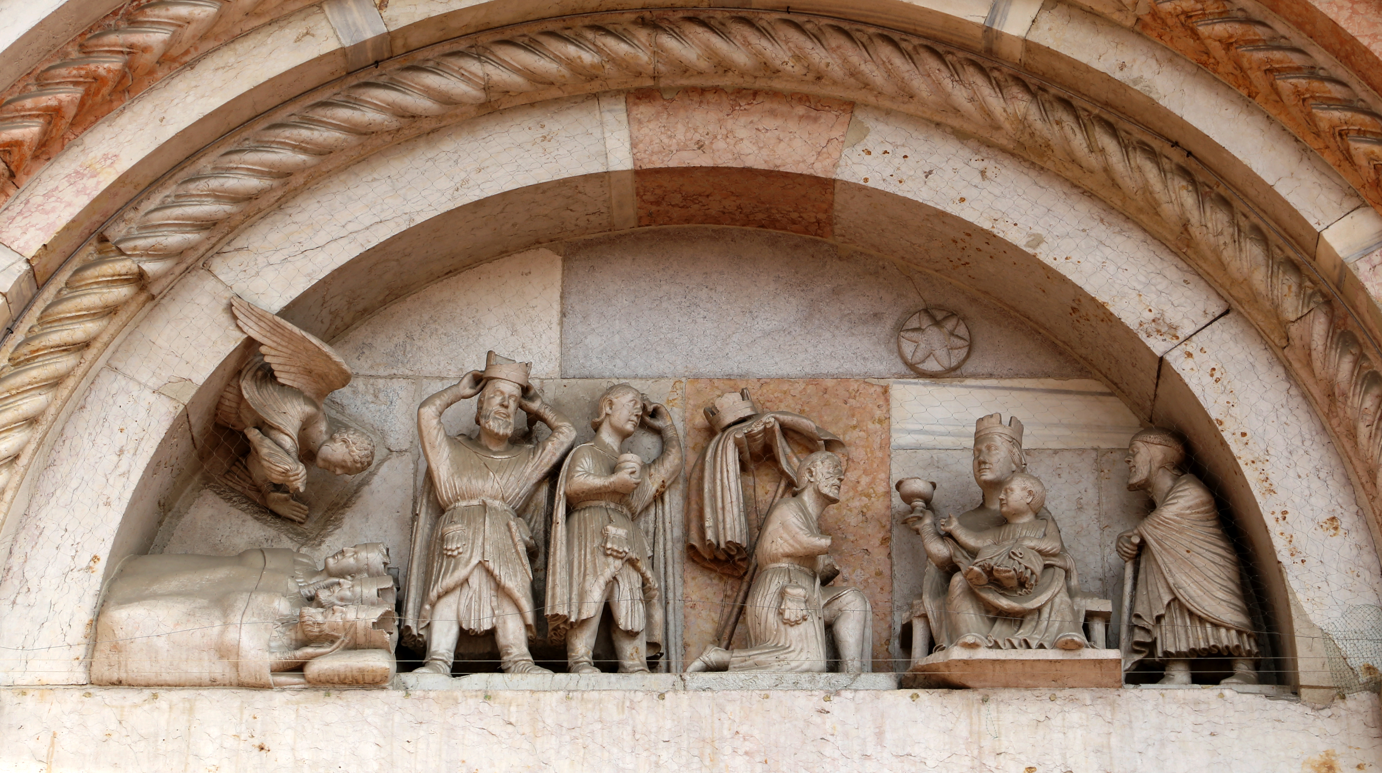 abbazia di San Mercuriale This is a photo of a monument which is part of cultural heritage of Italy.